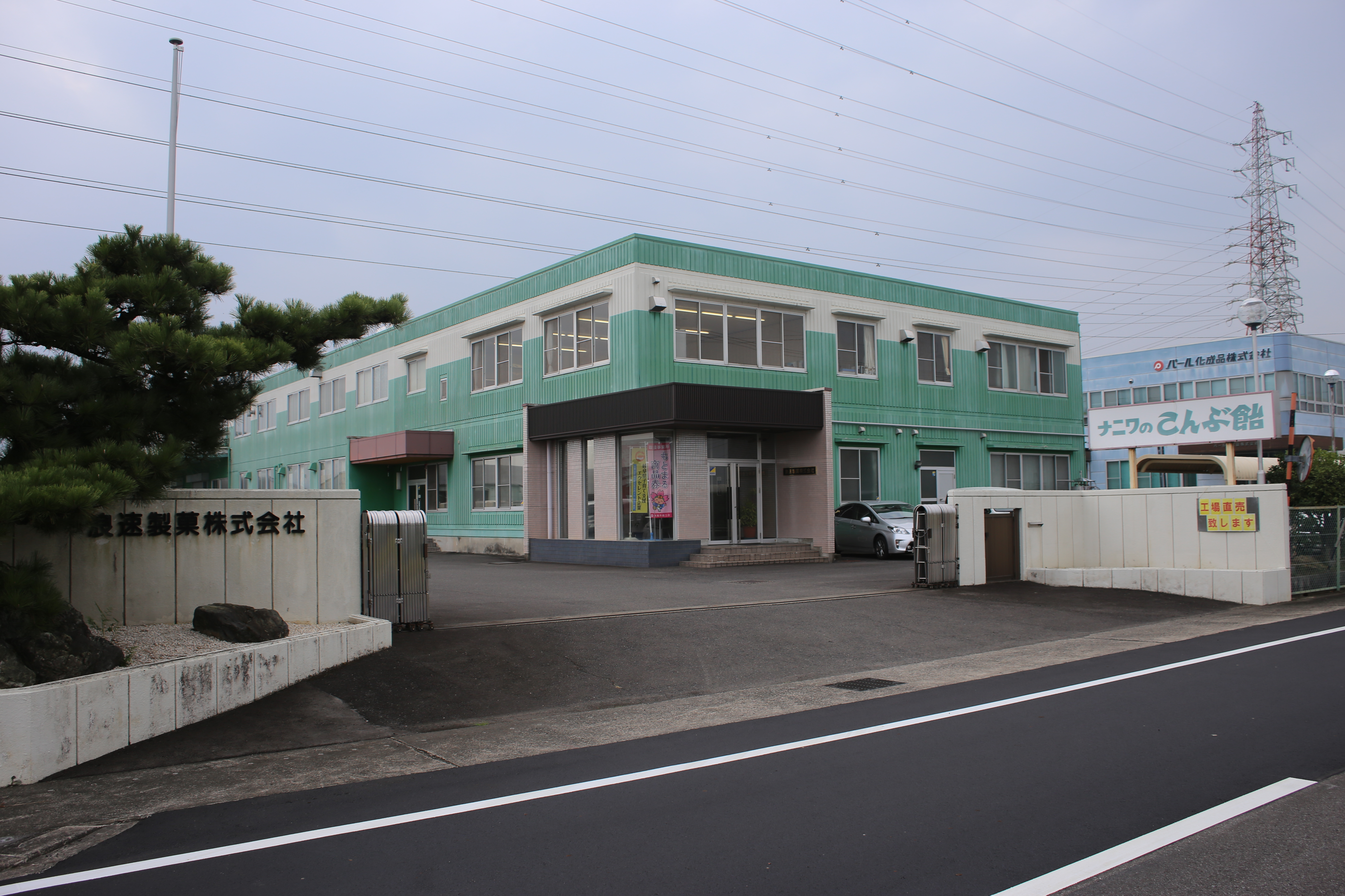 岐阜県本巣市温井の浪速製菓本社を東側公道南側より撮影